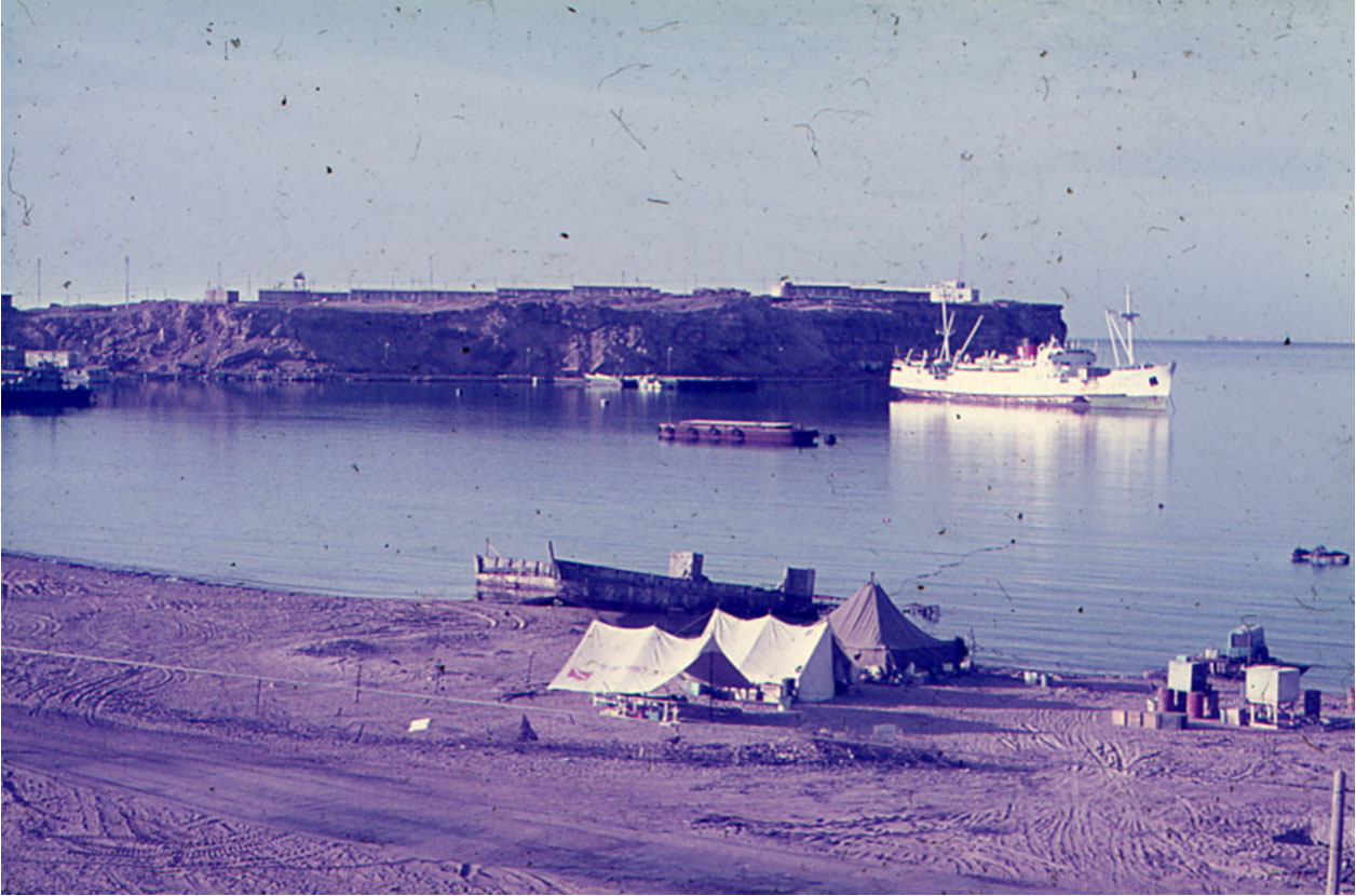 מחנה משלחת חפירות הספינה העותמאנית בשארם א-שיח